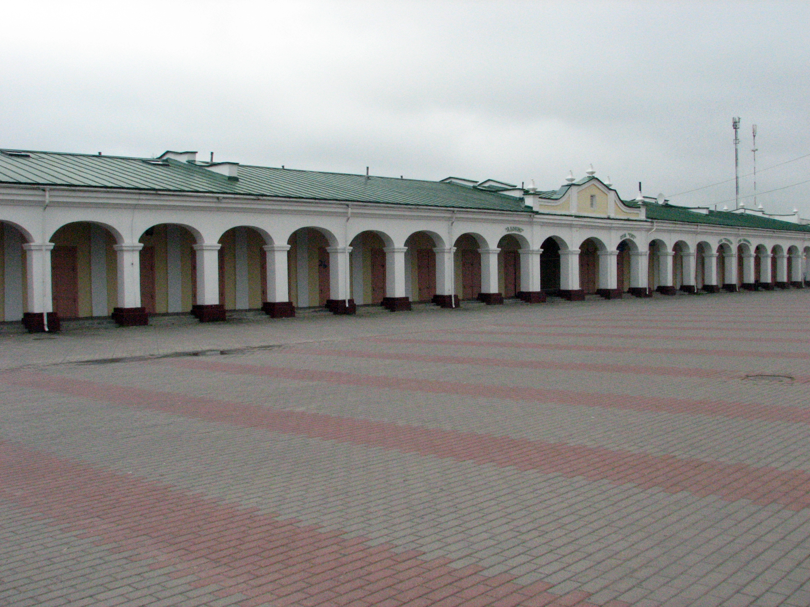 Беларуская (тарашкевіца): Белыя лаўкі (Пружаны). Выгляд з боку сабору Аляксандра Неўскага